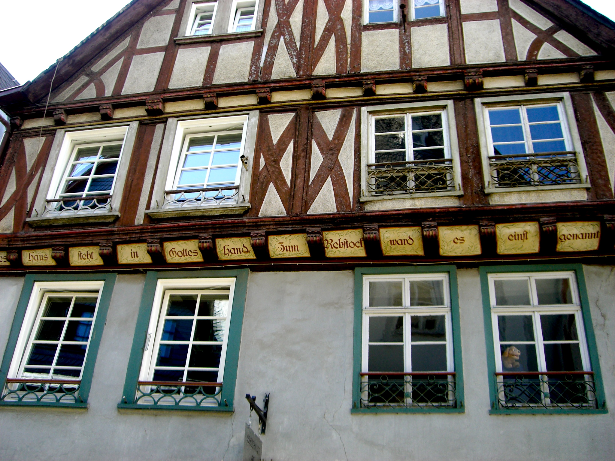 Fenstersanierung: Links Fenstersanierung nicht nach den Maßstäben der Charta von Venedig. Rechts historischer Fensterbestand.